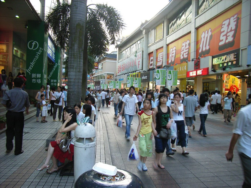 東門商業區, 又是"東門老街", 它是深圳一處有名的步行街 DM579